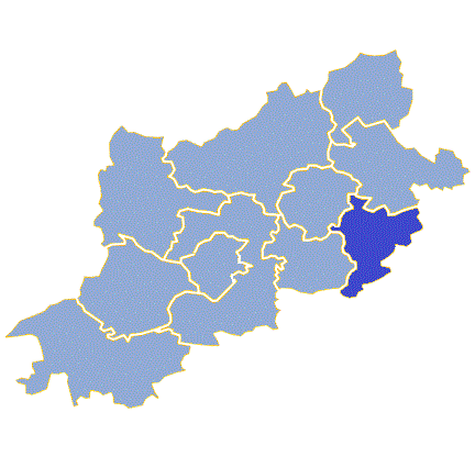 Powiat zielonogórski - Gmina Bojadła